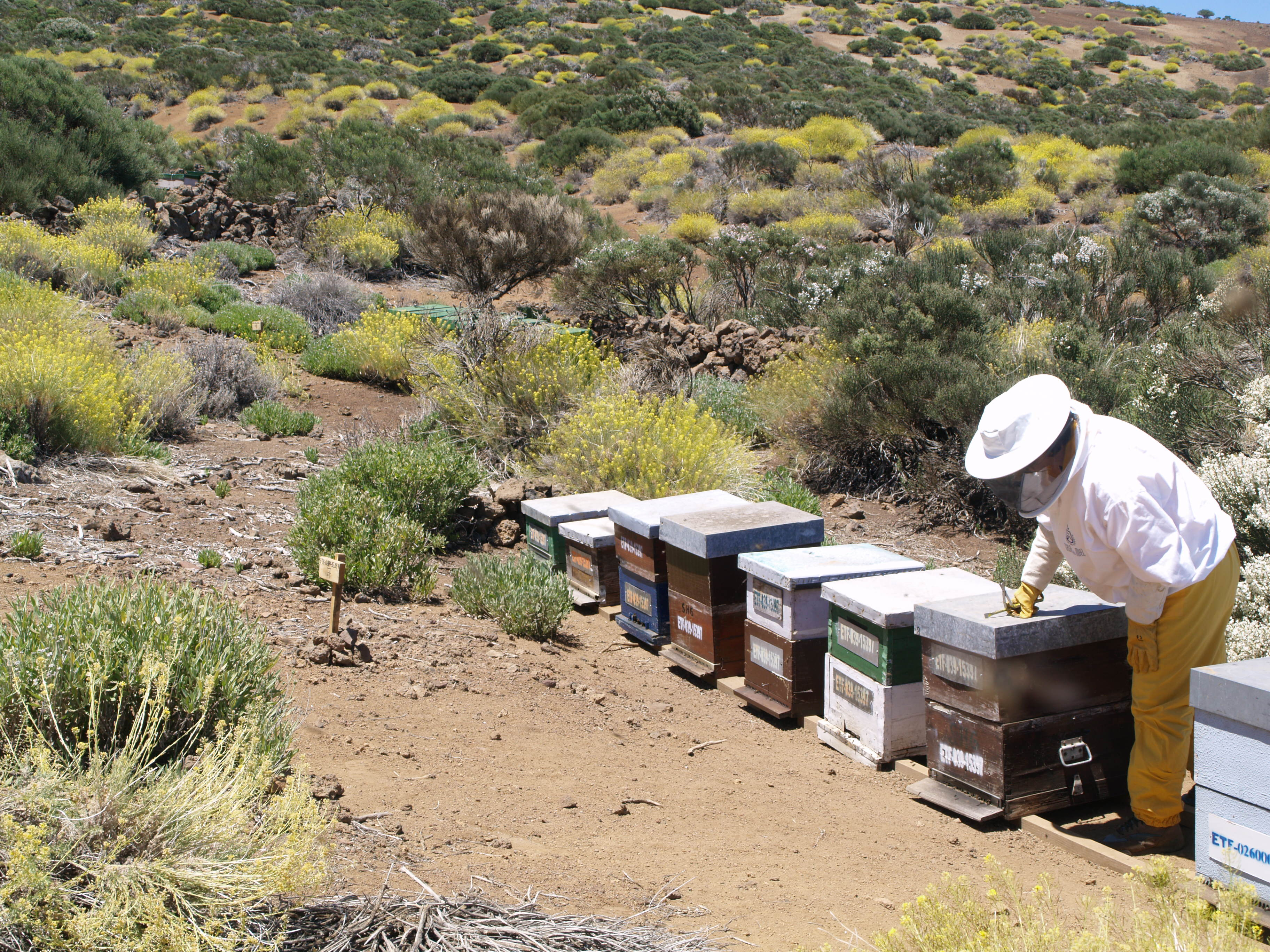 Apicultora en colmenar de las Cañadas del Teide